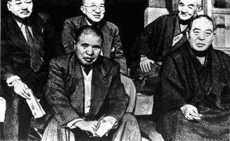 Yoshio Kodama meets Ichiro Hatoyama, Bukichi Miki in his house.